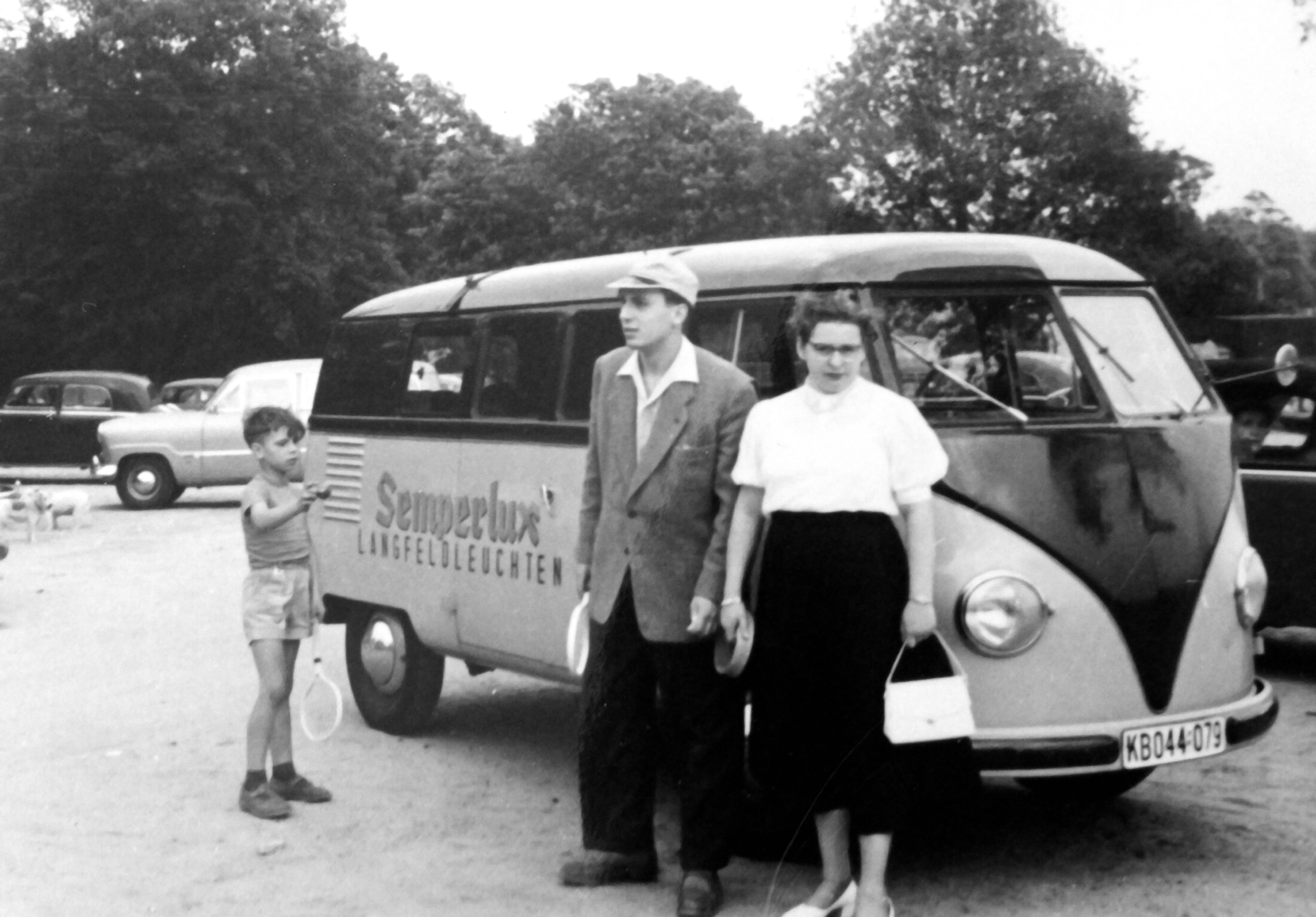 Familie Bansbach: Seit fast 70 Jahren glauben Bansbachs, dass Licht eine gesellschaftliche und kulturelle Bedeutung hat.